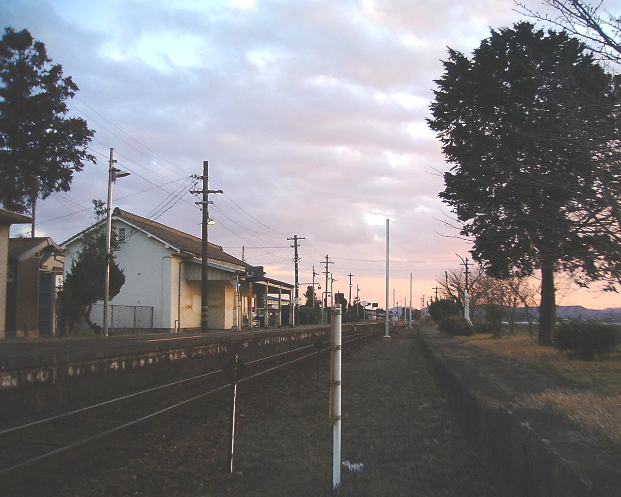 非電化時代の青野ヶ原駅構内 駅舎は改築前